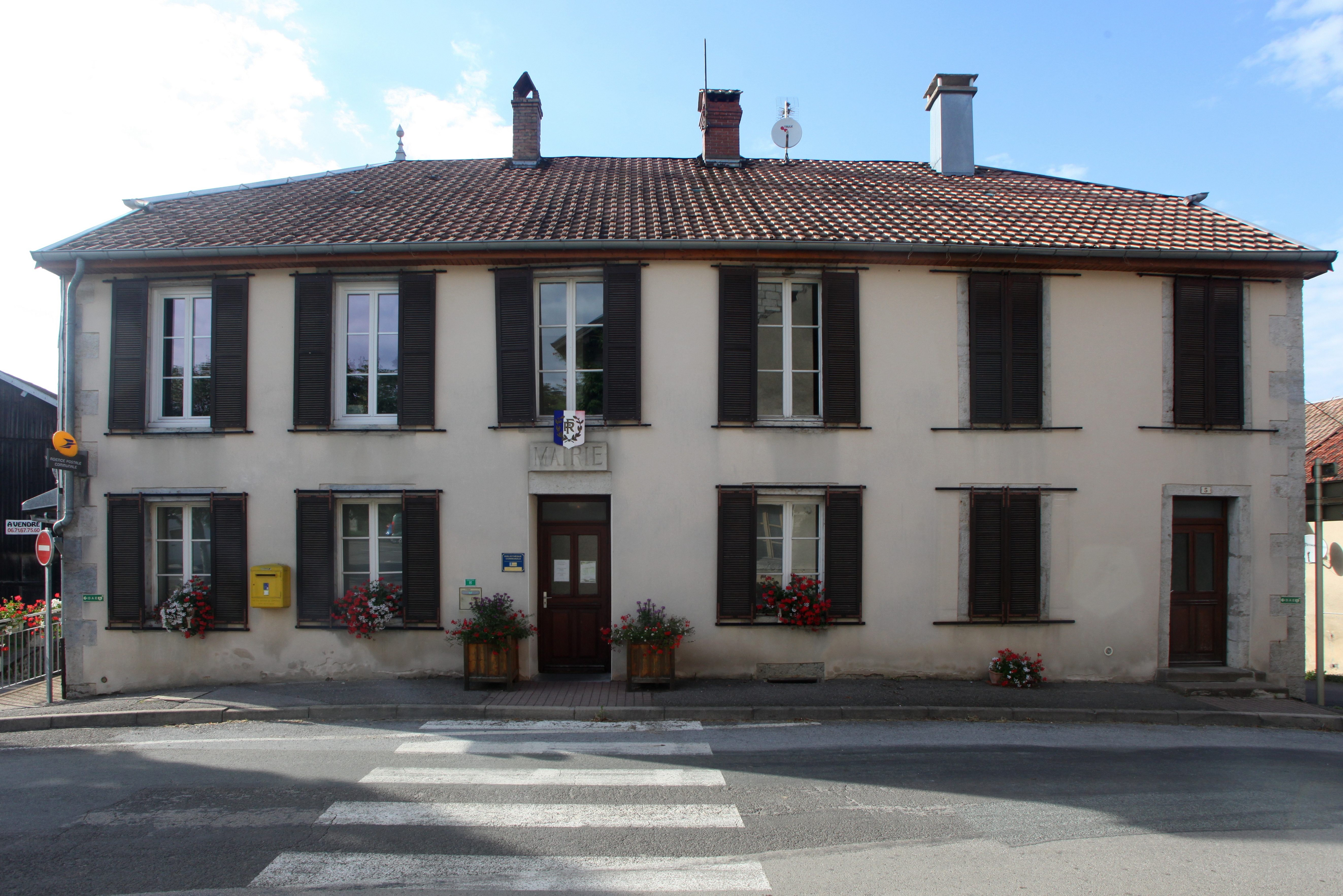 Mairie de Trépot (Doubs).